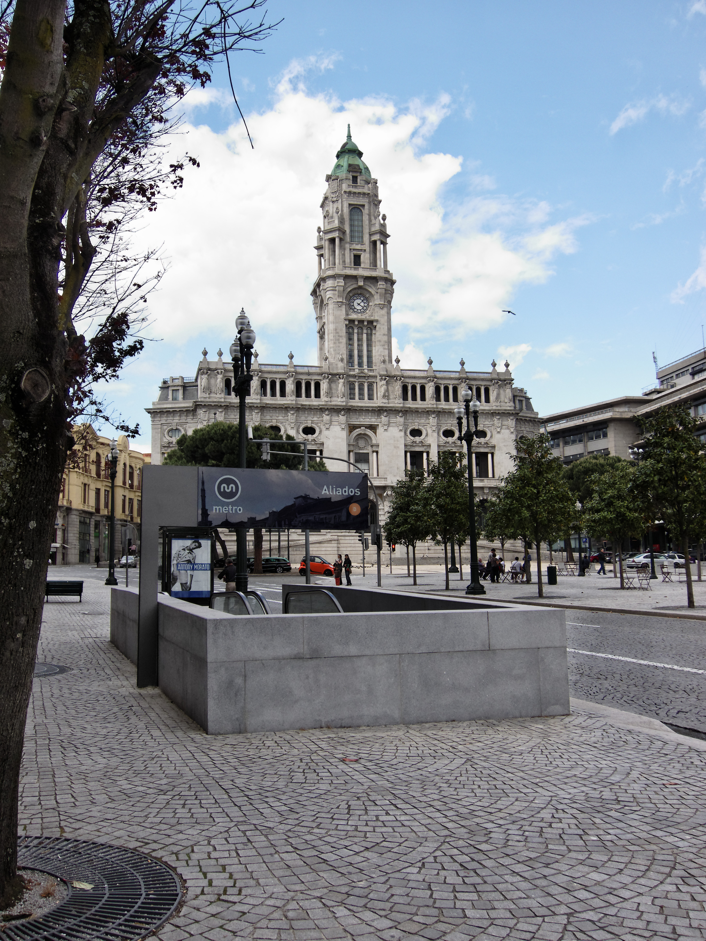 Acceso oeste a la estación de metro Aliados del Metro de Porto, Portugal.